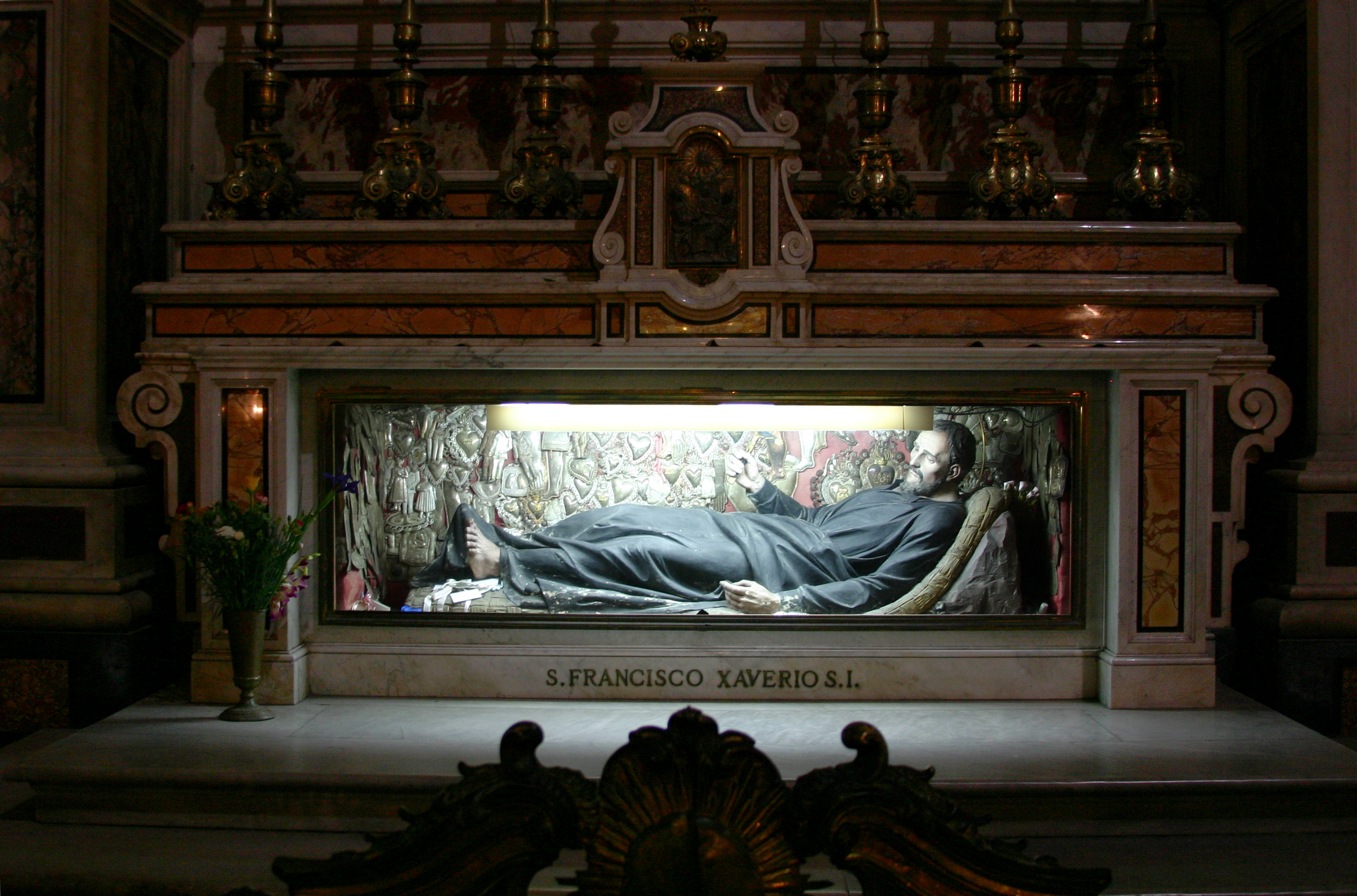 Gesù Nuovo - Naples